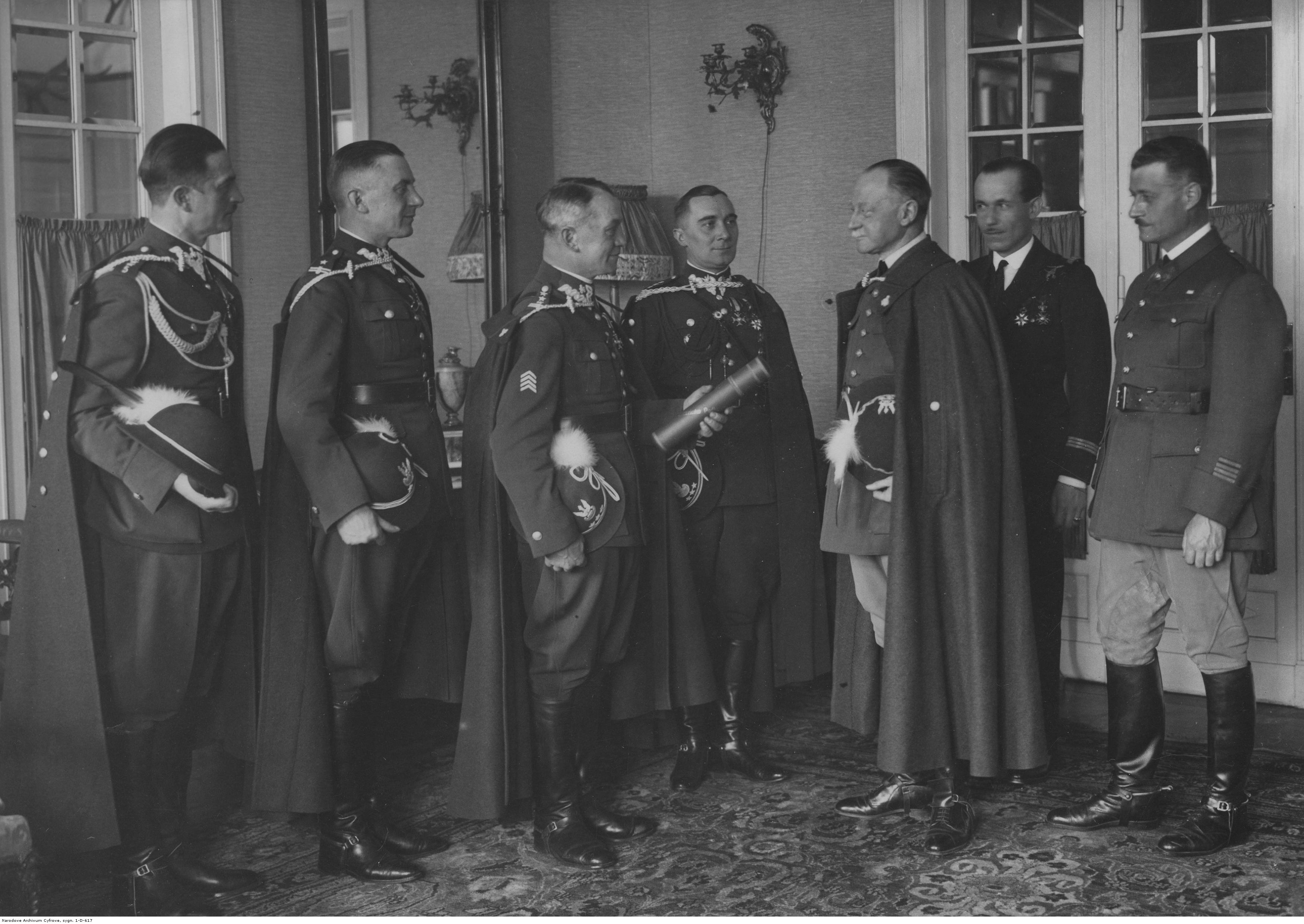 Odznaczenie attache wojskowego Ambasady Francji odznaką 5. Pułku Strzelców Podhalańskich. Delegacja oficerów Pułku wręcza attache wojskowemu Ambasady Francji w Polsce gen. Charles'owi d'Arbonneau (trzeci z prawej) odznakę pułkową. Koncern Ilustrowany Kurier Codzienny - Archiwum Ilustracji. Sygnatura: 1-D-617